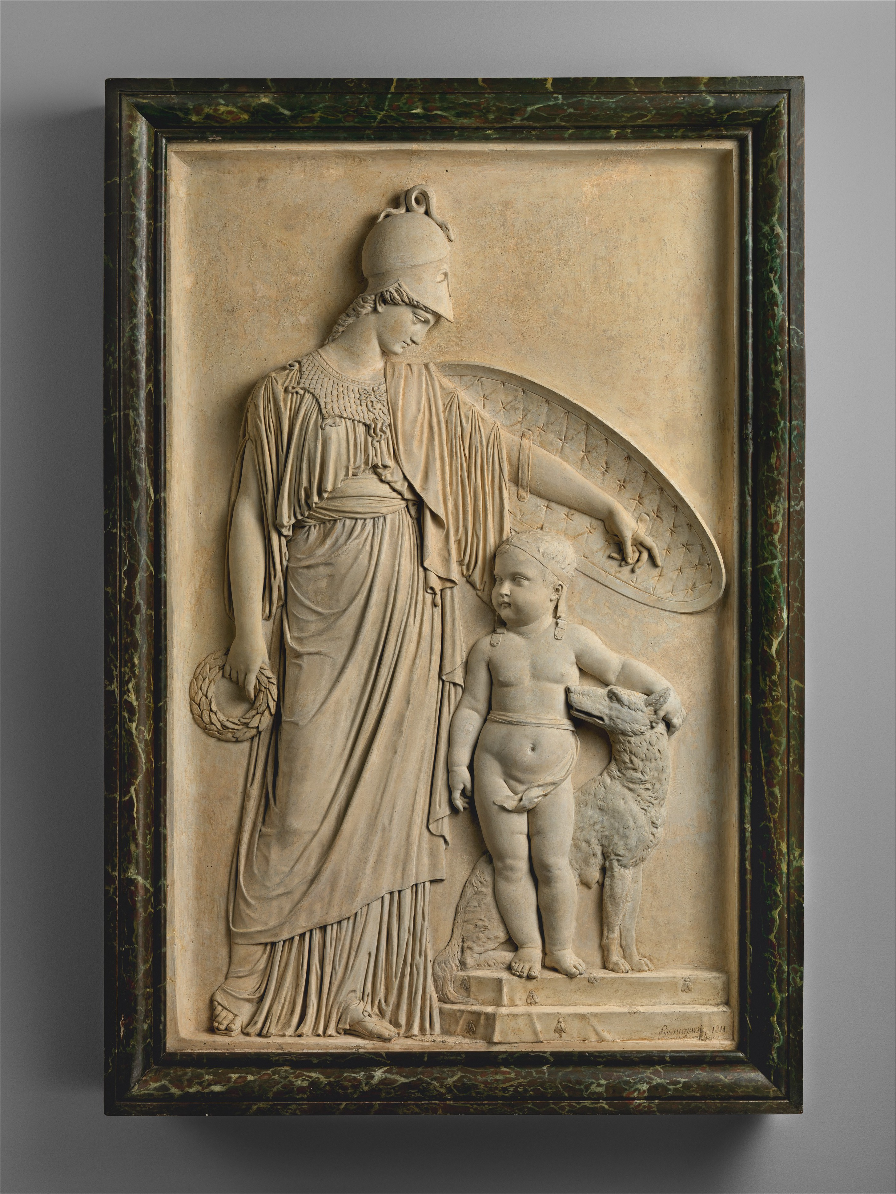 French; Relief; Sculpture